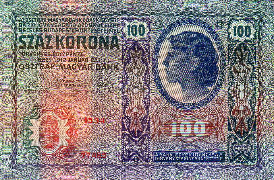 100 Austro-Hungarian Krone/korona (1912) - reverse